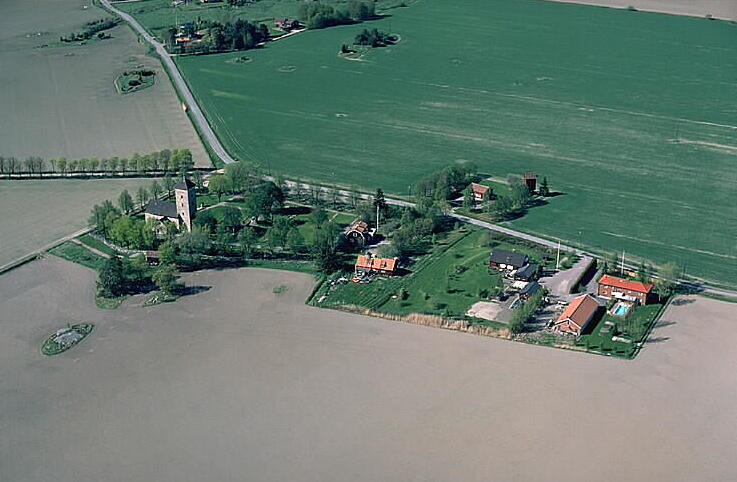 Skånela kyrka, klockargården och hembygdsmuseet. Motiv: Skånela Nyckelord: Flygbilder, Riksintressen Kategori: KyrkomiljöSkånela kyrka, klockargården och hembygdsmuseet.